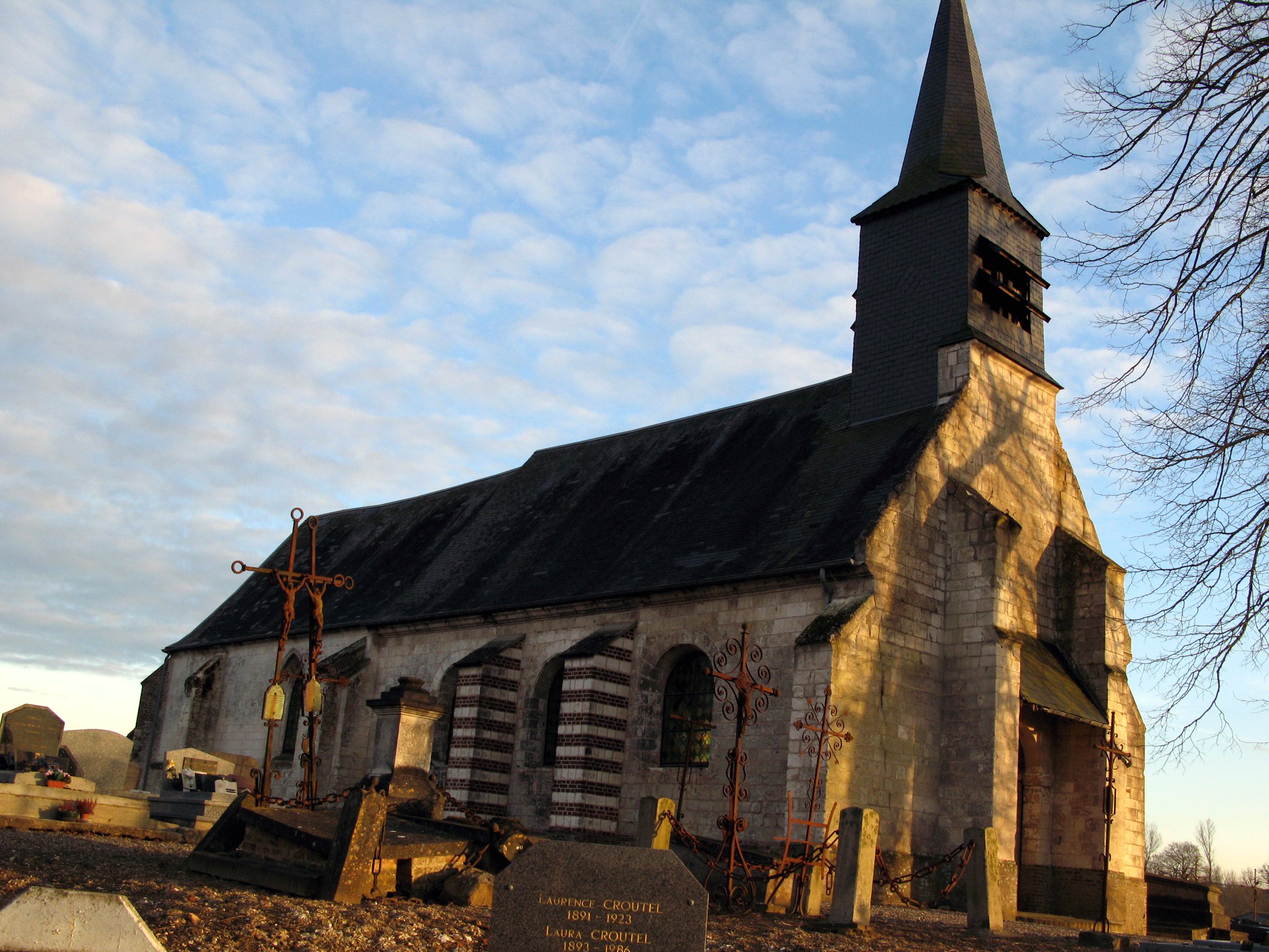 Eaucourt-sur-Somme (Somme, France) - L'église (clocher et façade Nord). .